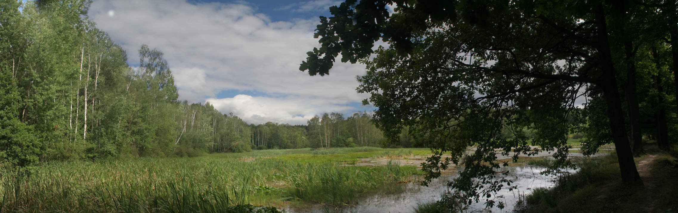 Dolni kokotsky rybnik 2